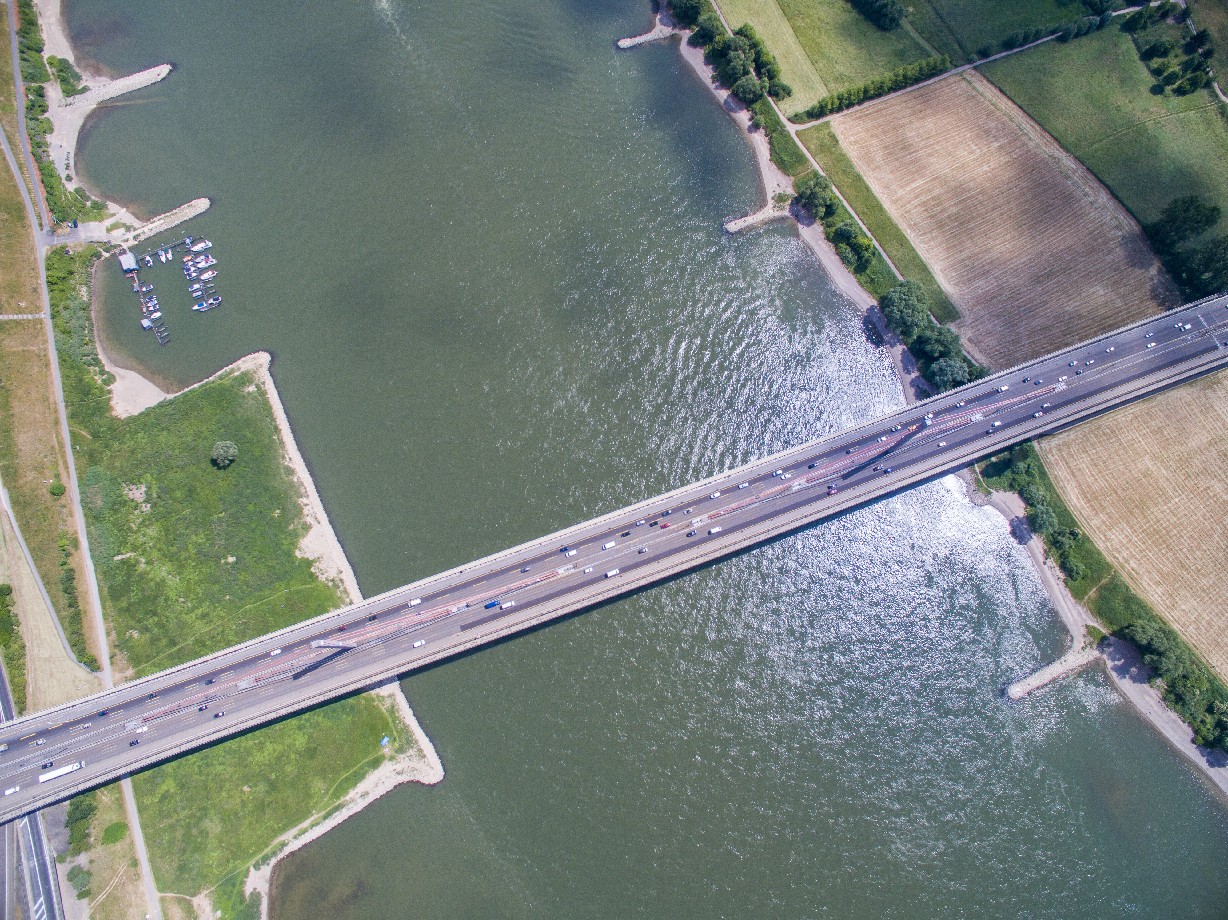 Eine der meist frequentierten Autobahnbrücken Deutschlands. Die Staugefahr hier ist sehr hoch.